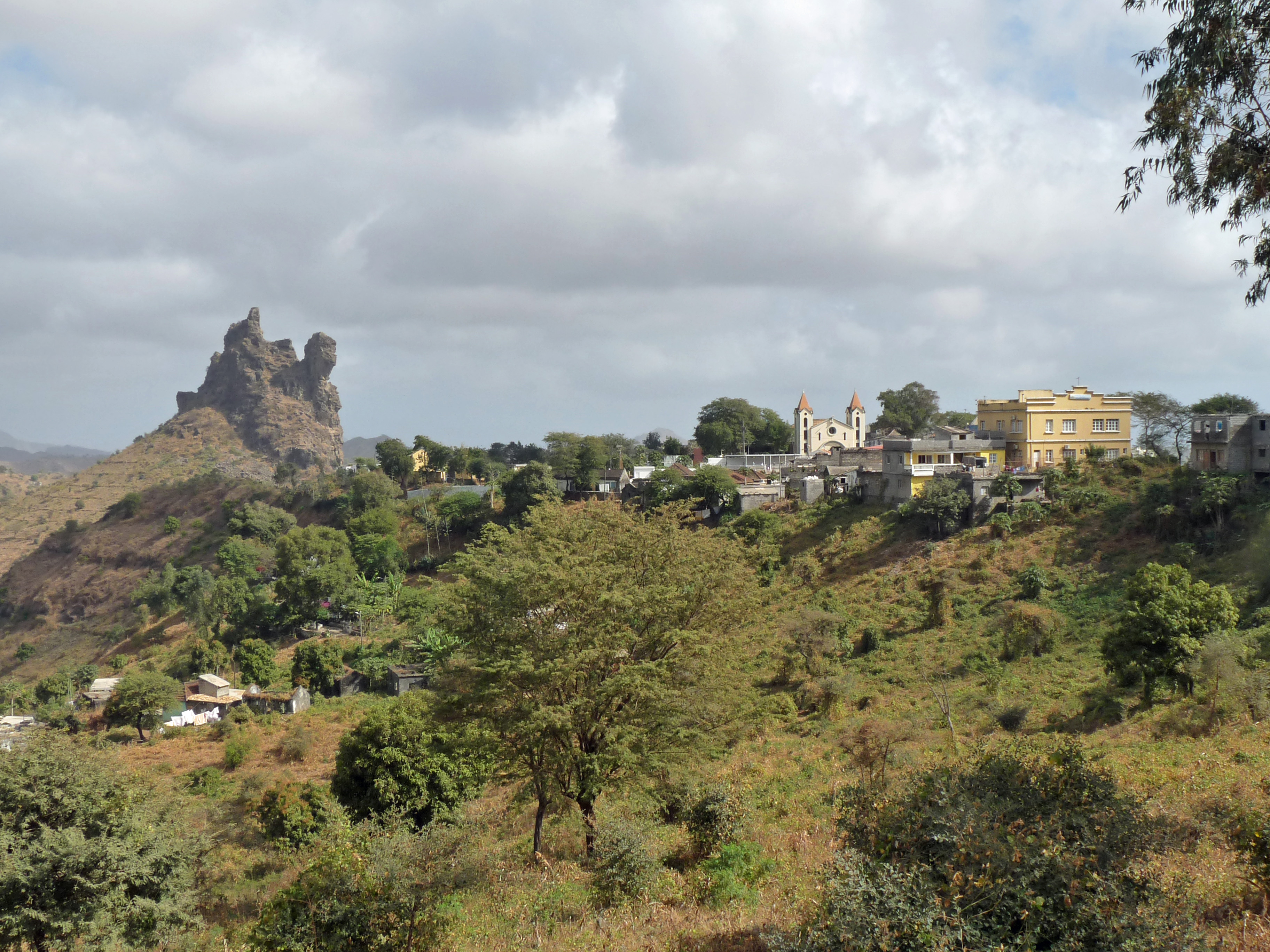 Picos (île de Santiago, Cap-Vert) : le village et son rocher